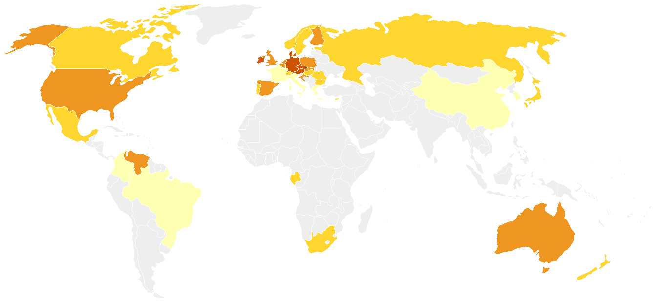 La consommation annuelle de bière par habitant dans le monde: moins de 1 litre. de 10 à 50 litres. de 50 à 75 litres. de 75 à 110 litres. Plus de 110 litres